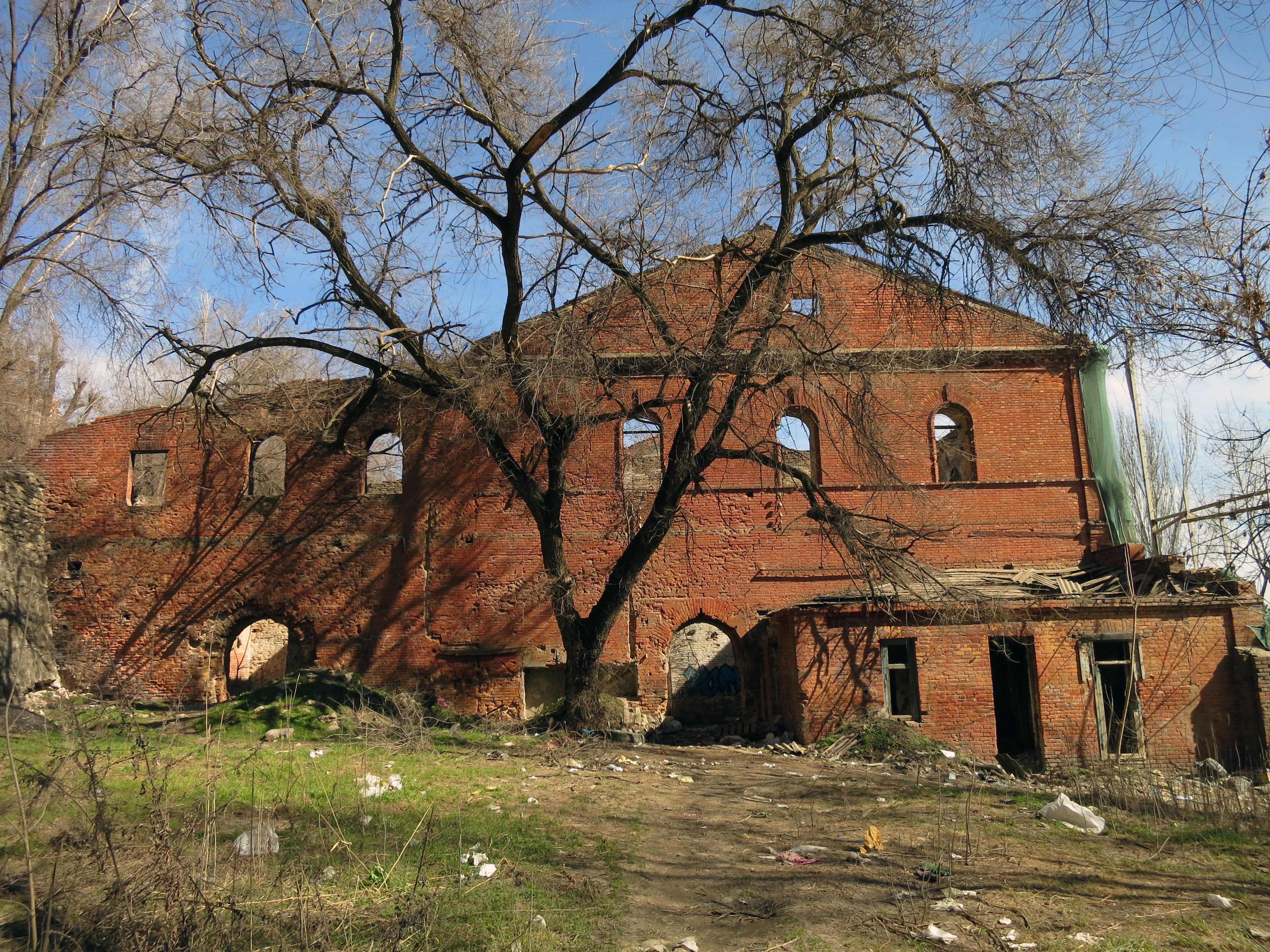 Склады экспортные зерновые (пять корпусов): улица Береговая, 47 А, 49, 51 А, 51 Б, В, 51 Г, Ростов-на-Дону, Ростовская область